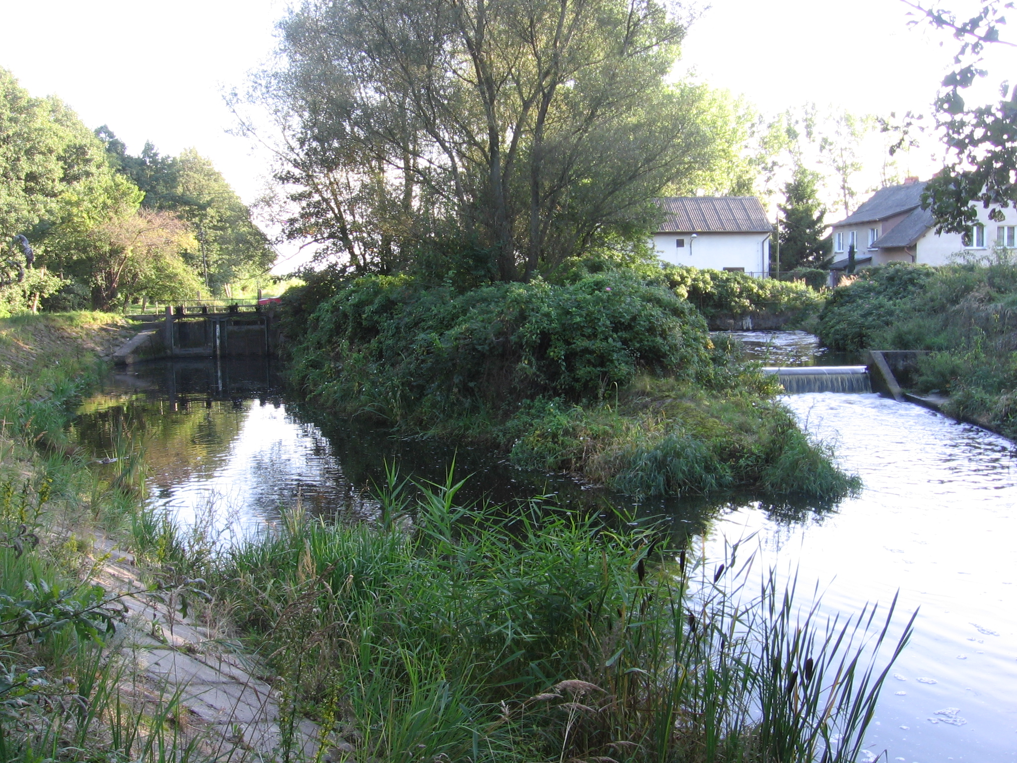 Karwianka, miejsce połączenia strumieni płynących z Karwiańskich Błot Pierwszego (z lewej) i Drugiego (z prawej)